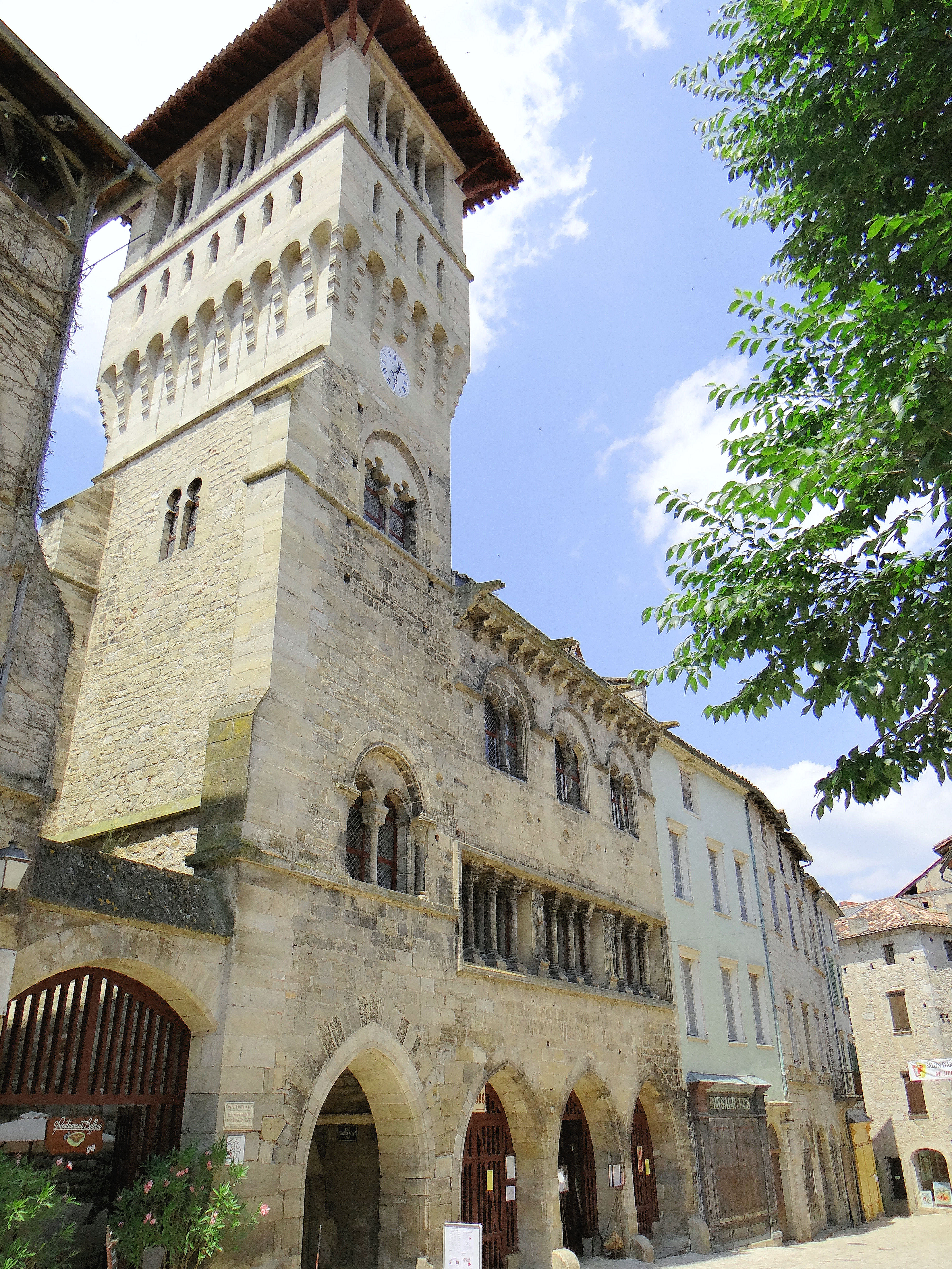 Saint-Antonin-Noble-Val - Ancien hôtel de ville - Ensemble sur la place de la Halle